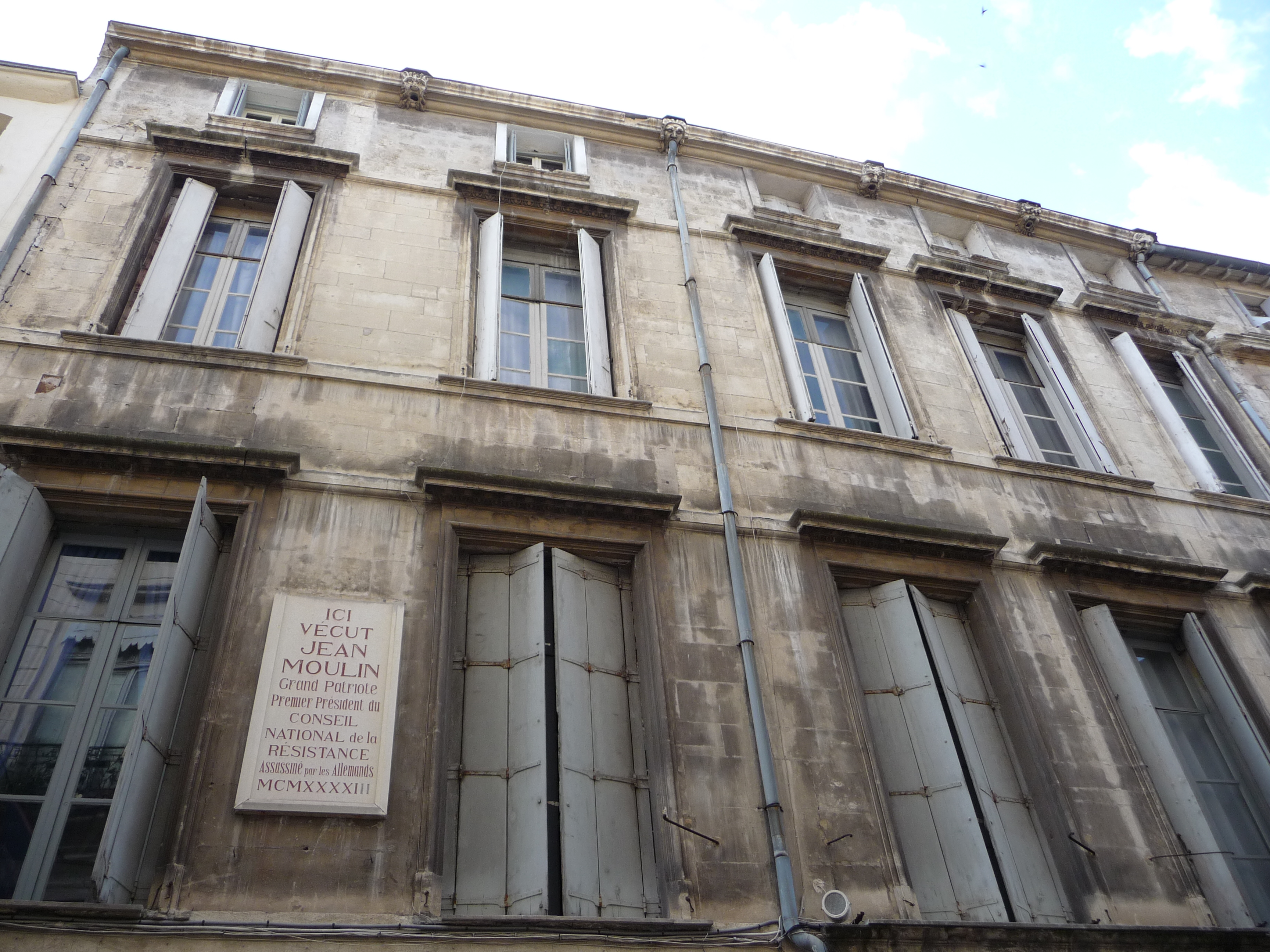 Façana principal de l'Hôtel Rey (Montpeller)